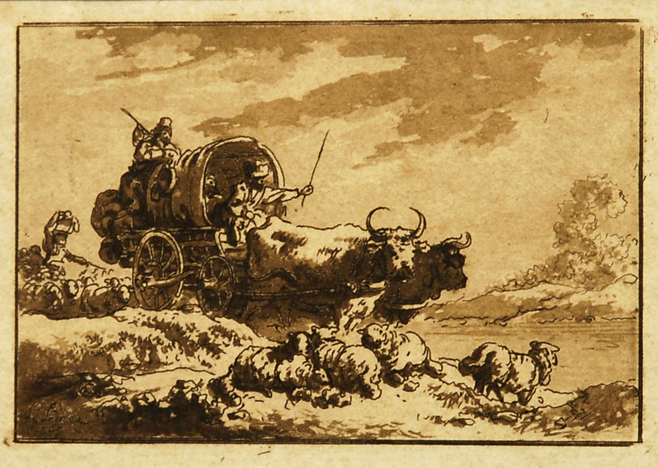 Leprince, Jean Baptiste (*1734, † 1781): Aquatinta 1769, 7 x 10 cm. Szene aus dem russischen Volksleben. In der Platte signiiert ("Le Prince") und datiert.